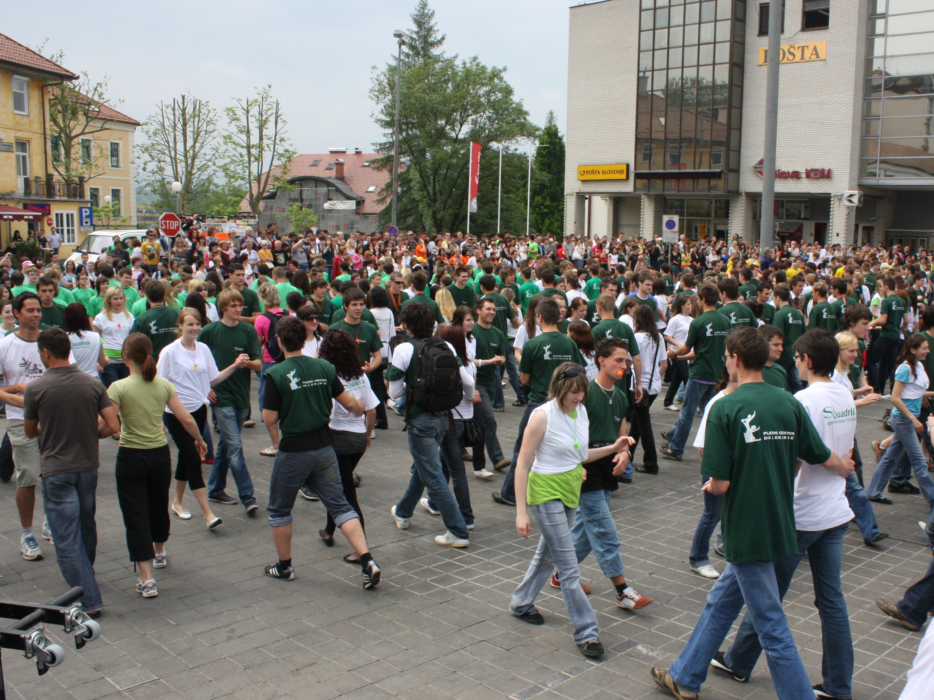 Maturantska parada NM 2009